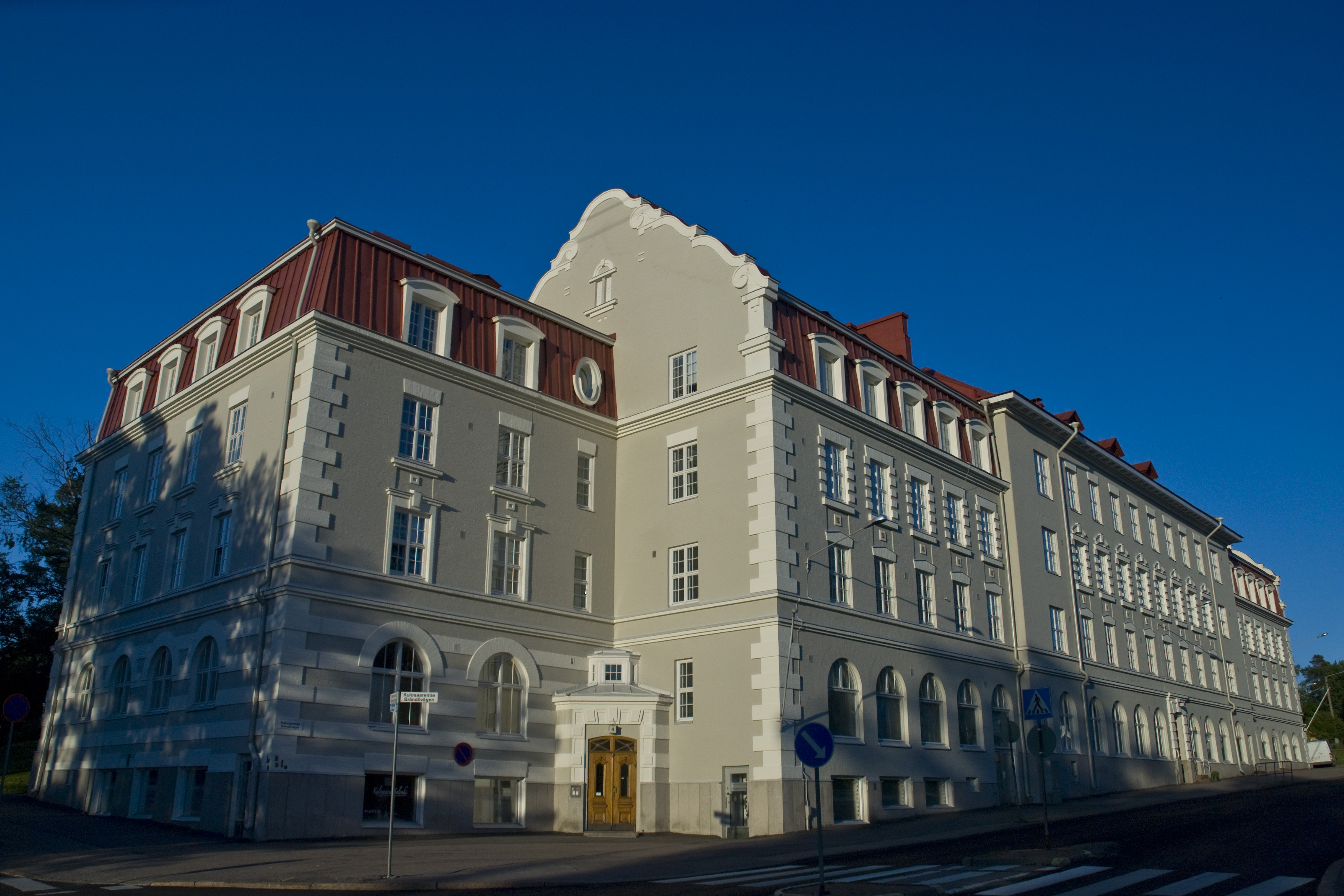 Kulosaaren Domus, rv. 1915-16 (J.S.Sirén, V.& I.Thomé)